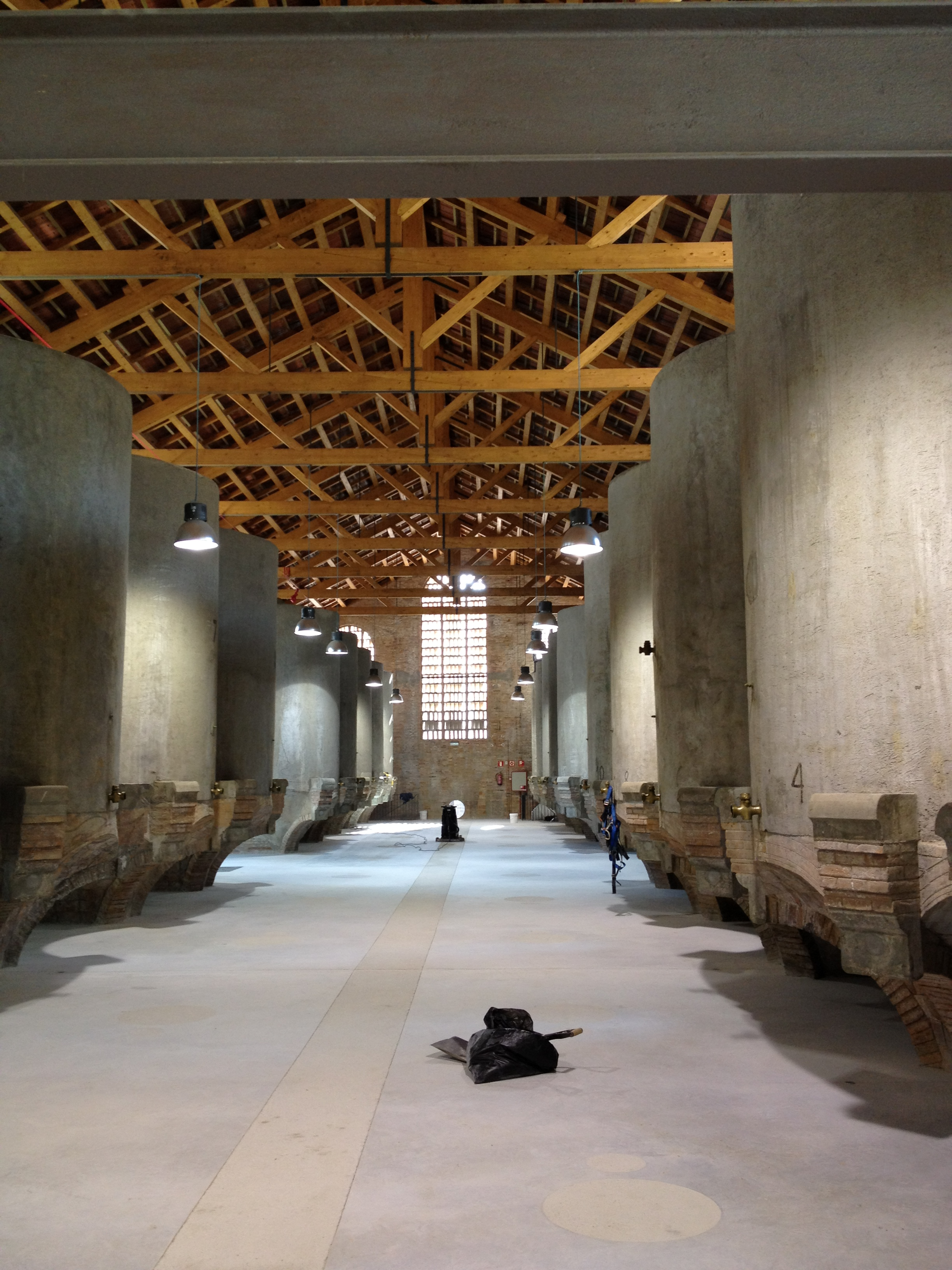 Planta principal del Celler Cooperatiu de Rubí. Modernisme